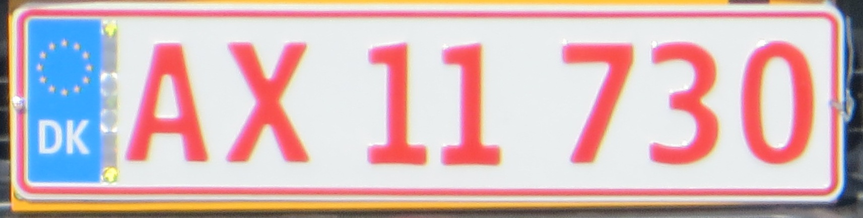 Fietsendrager kentekenplaat Denemarken